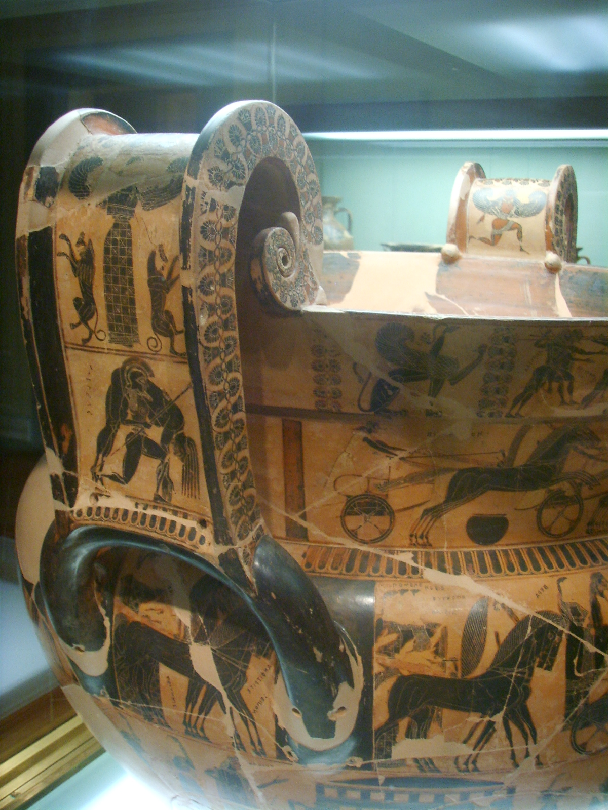 Athenian volute-krater.